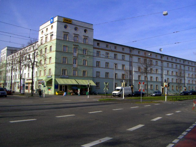 südliche Erlenhofsiedlung Mannheim